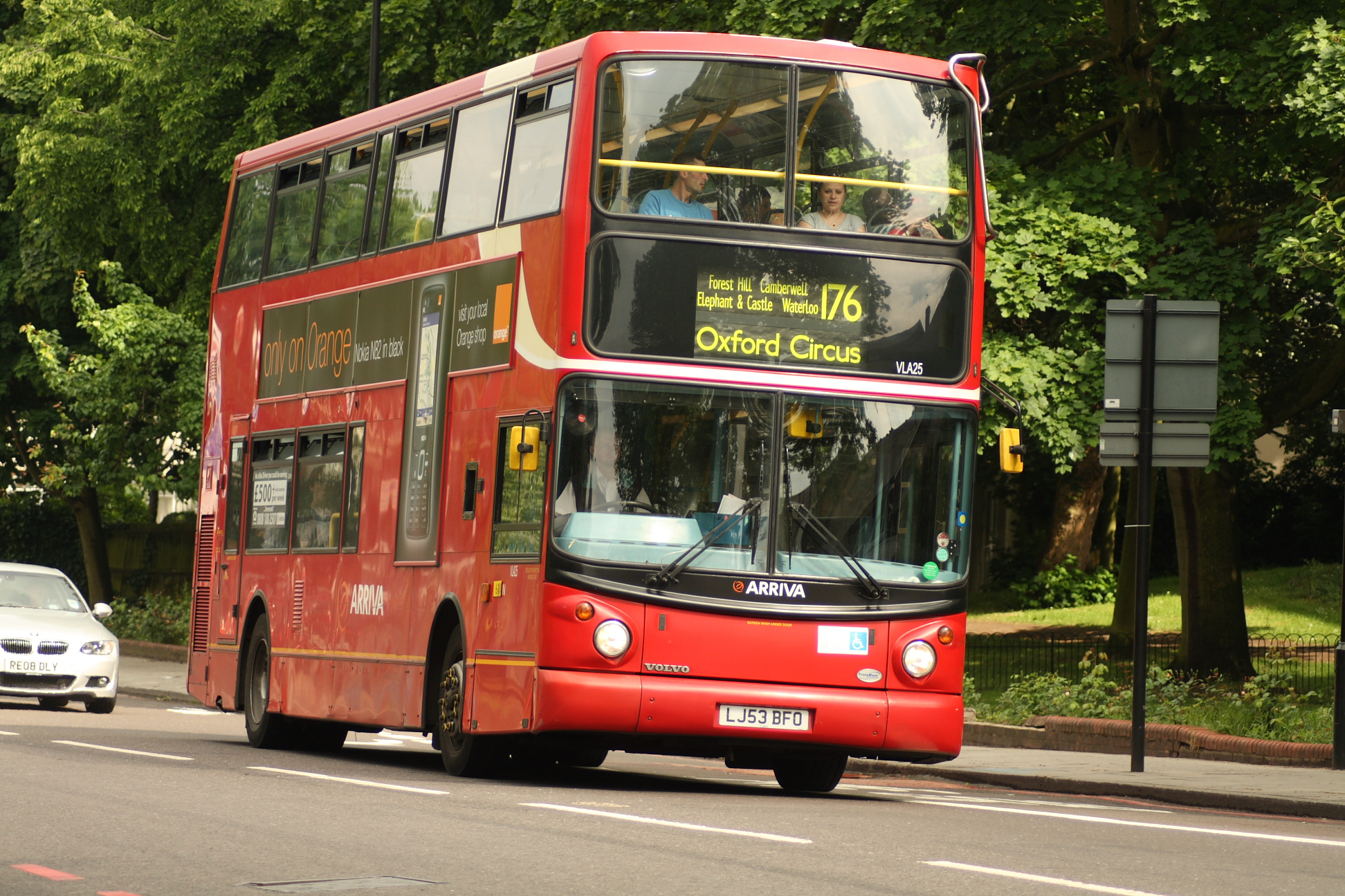 DPP_1031